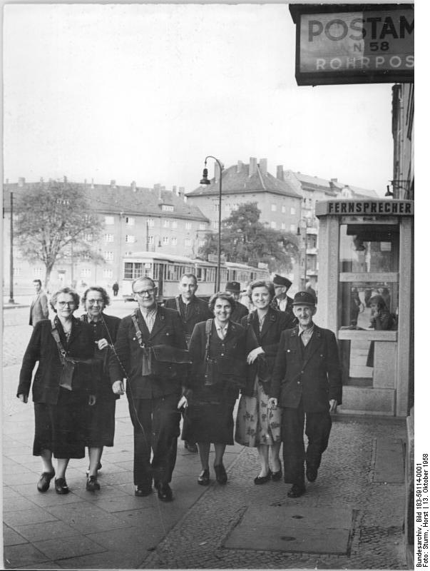 Zentralbild Sturm 13.10.1958 Zur Vorbereitung der Wahlen: Kandidaten stellen sich vor. Am 13.10.1958 kamen die Zusteller des Postamtes N 58 in der Eberswalder Straße in Berlin zu einer Wahlversammlung zusammen, auf der sich eine Kandidatin für die Wahl zur Stadtverordnetenversammlung aus dem Wahlkreis II im Stadtbezirk Prenzlauer Berg, die Angestellte beim Deutschen Roten Kreuz, Martha Corts, ihren Wählern vorstellte. UBz: Die Postzusteller auf dem Weg zu ihrer Versammlung.